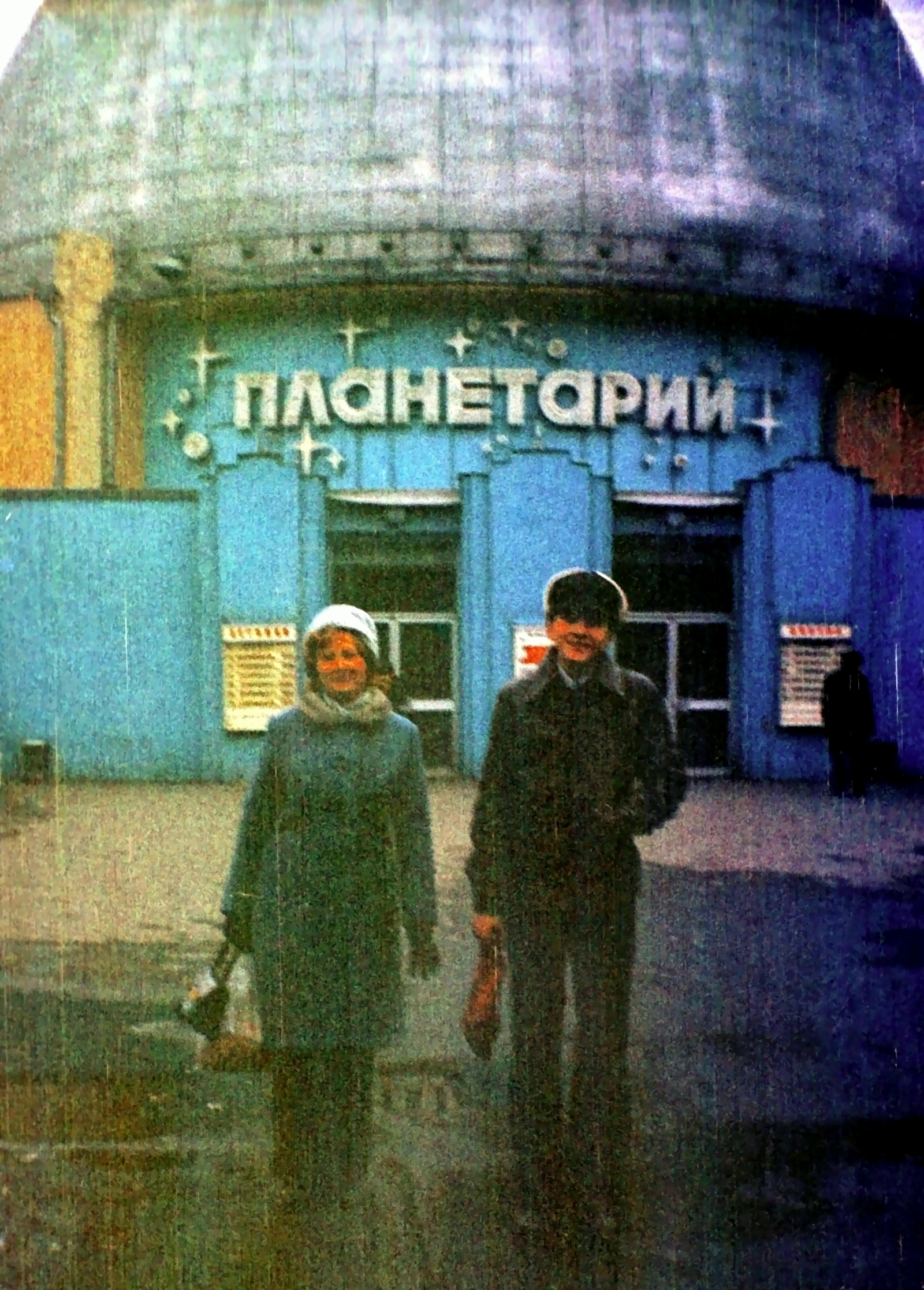 Е. А. Богатов у старого планетария в Москве, 1980 год.